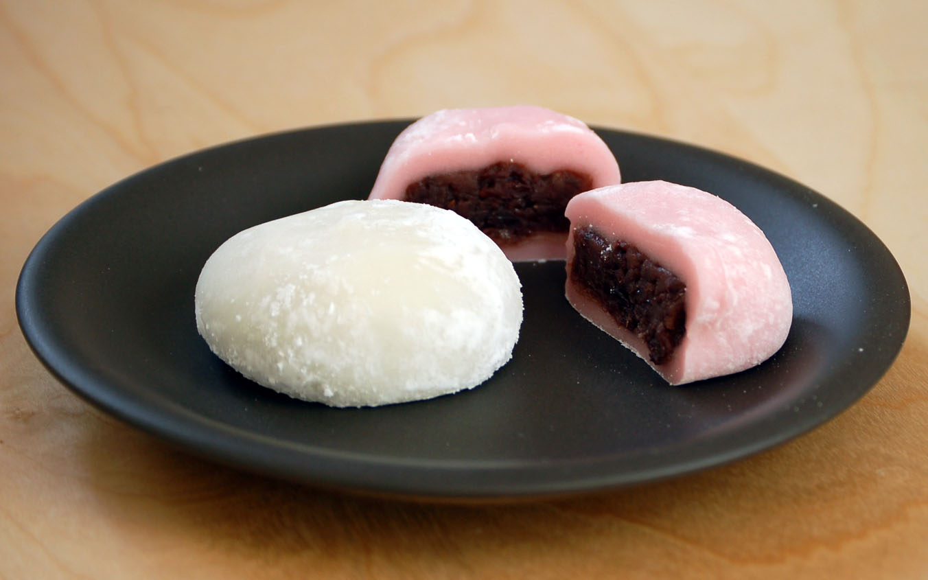 Beschreibung: Daifuku, japanische Küchlein aus Reismehl, gefüllt mit Anko, einer gesüßten Paste aus roten Adzukibohnen Description: Daifuku, small japanese rice cake, filled with a sweetened paste of red azuki beans Quelle: selbst fotografiert, April 2006 Photographer: Alice Wiegand, (Lyzzy)